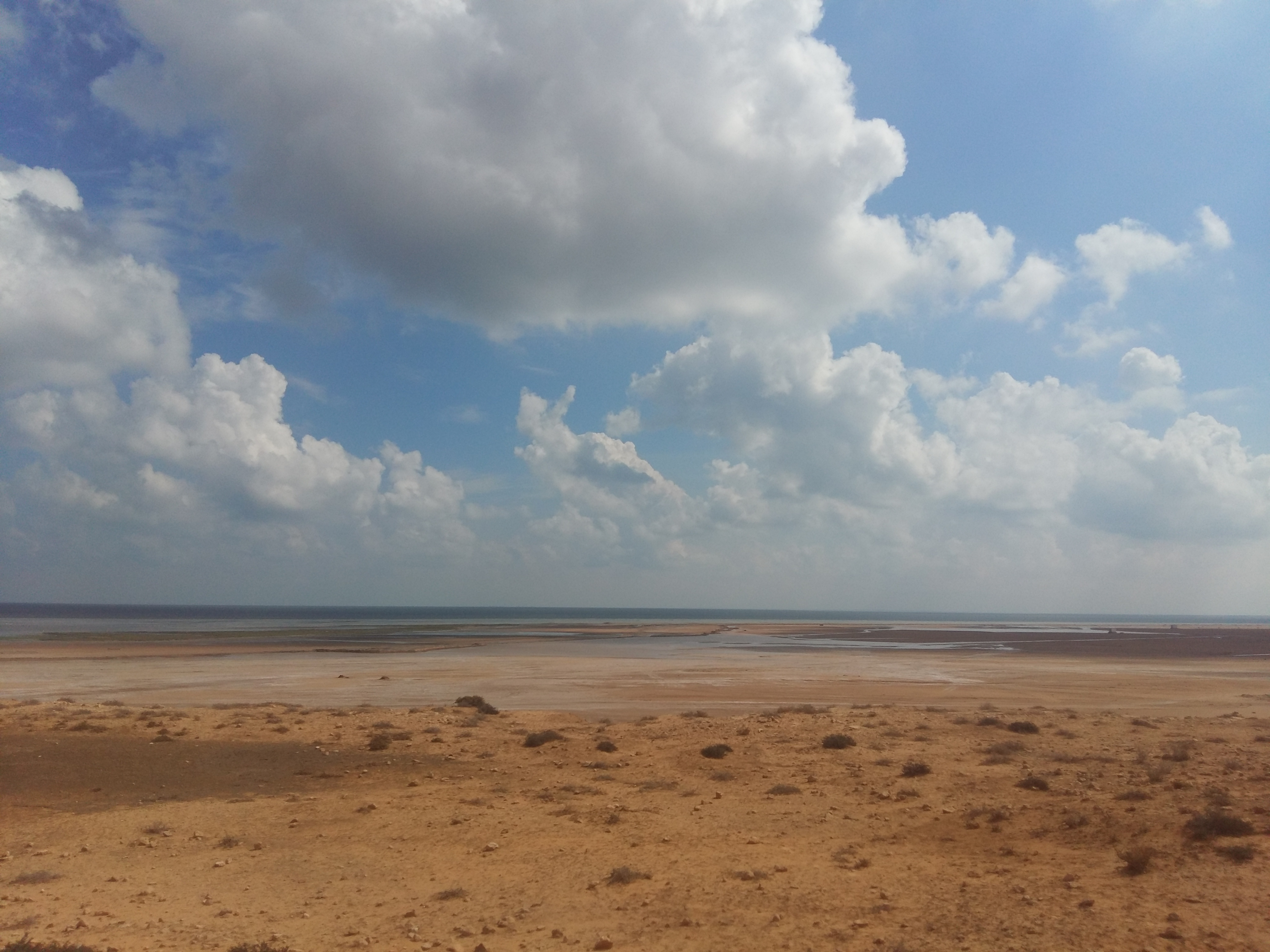 Golfe de Boughrara